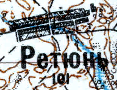 Топографическая карта Ленинградской области, квадрат VIc-28 (Луга), деревня Ретюнь